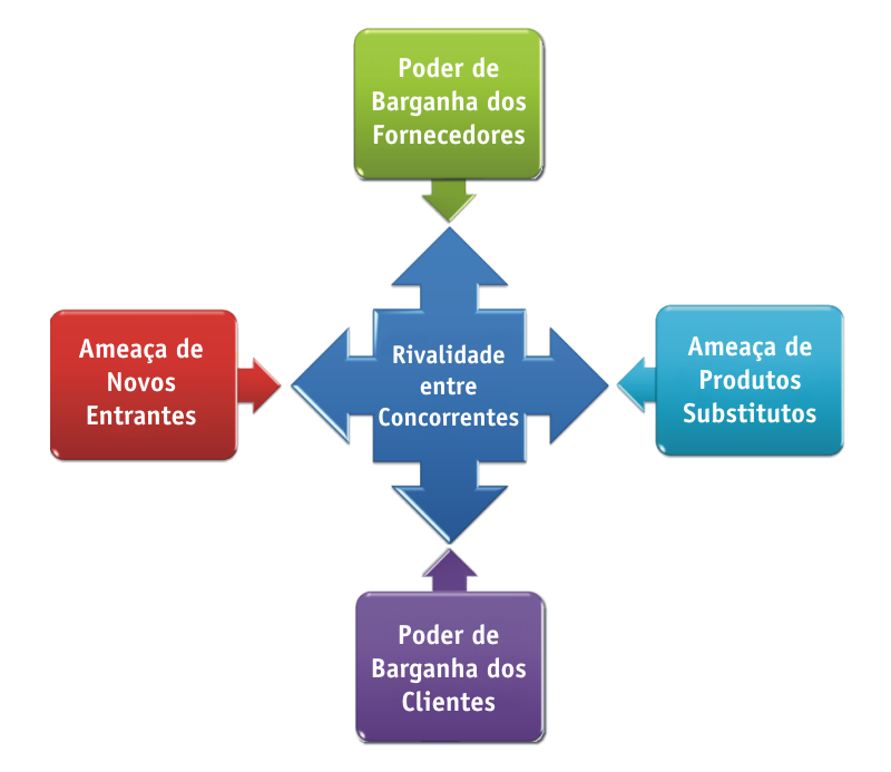 Cinco Forças de Porter. Autor: Arnaldo Rabelo